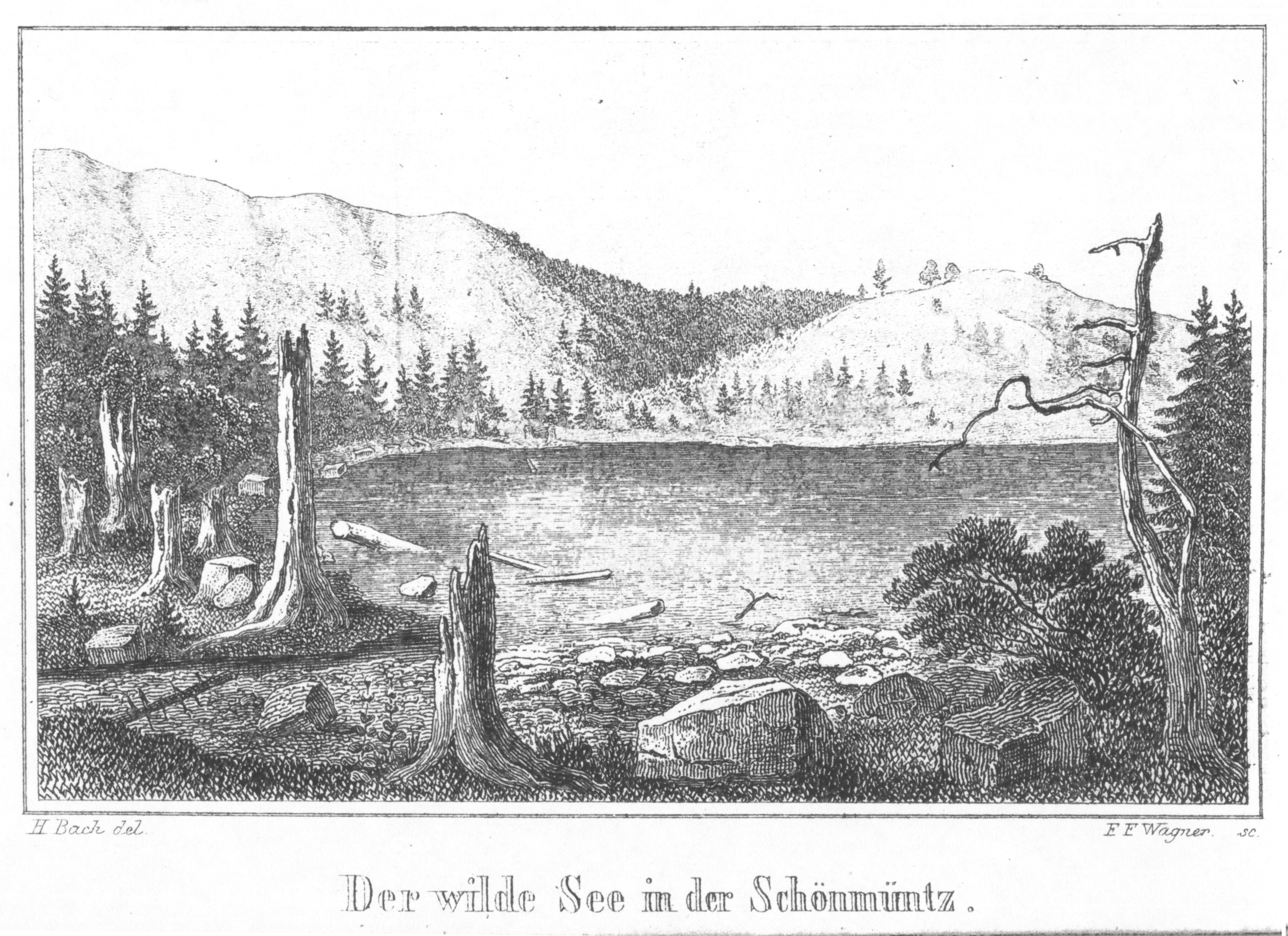 Beschreibung des Oberamts Freudenstadt